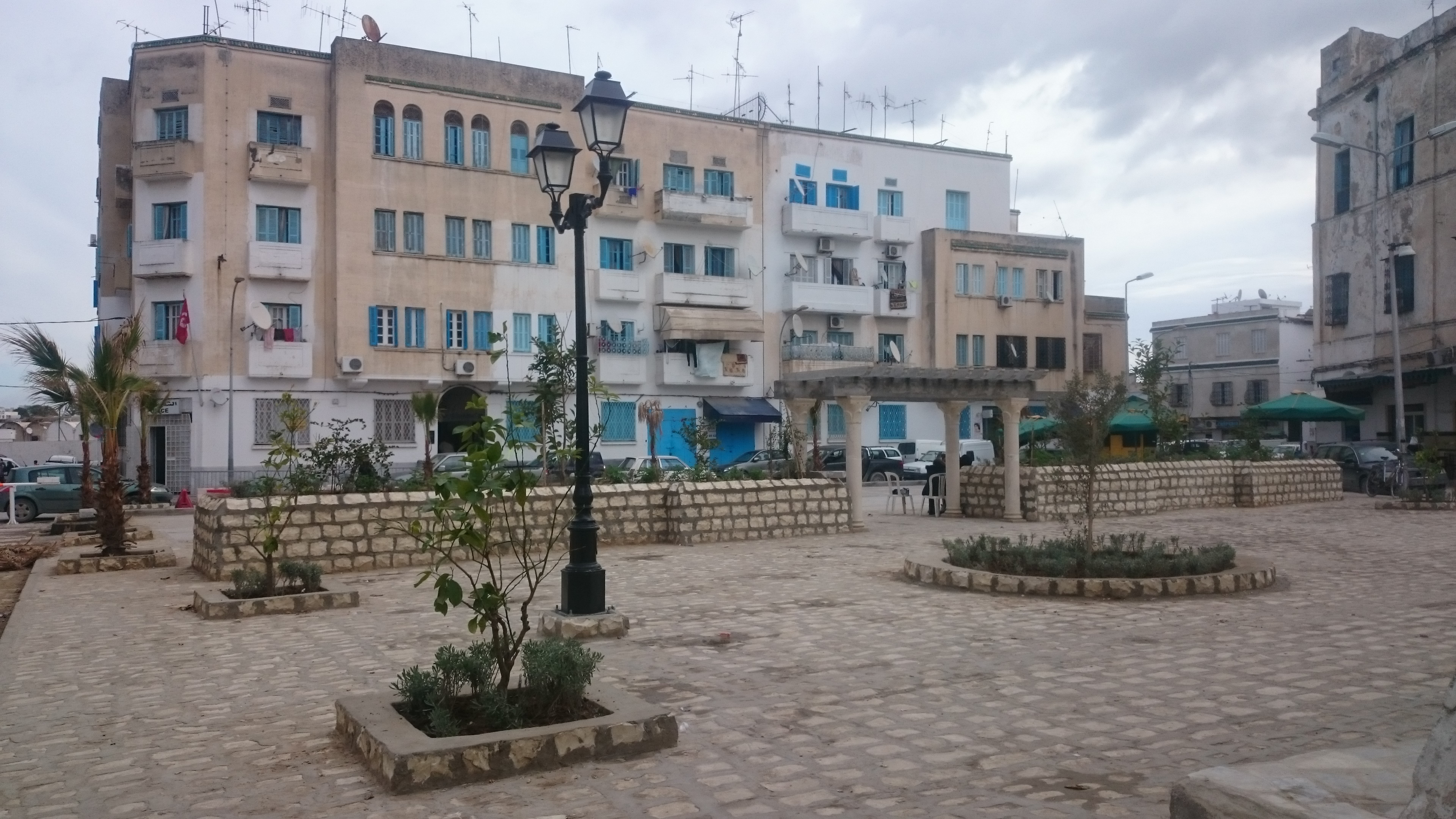 Hara ou El Hafssia